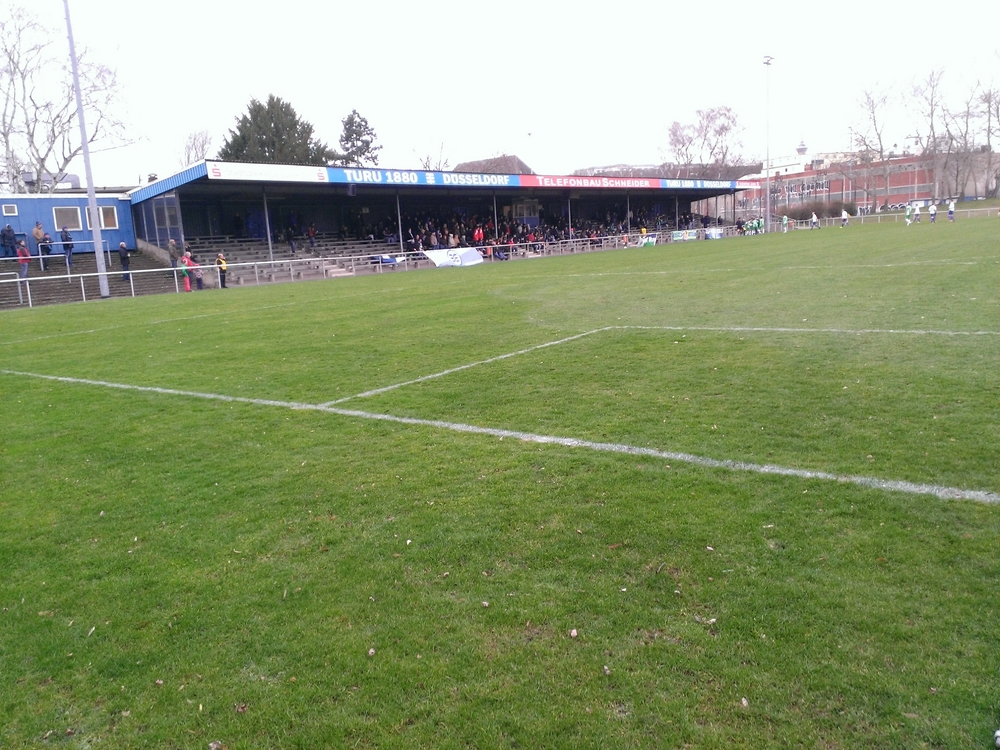 Haupttribüne des Stadion an der Feuerbachstraße